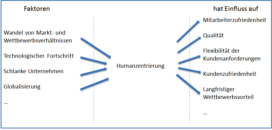 Darstellung der Faktoren der Humanzentrierung sowie den Einfluss auf das Unternehmen